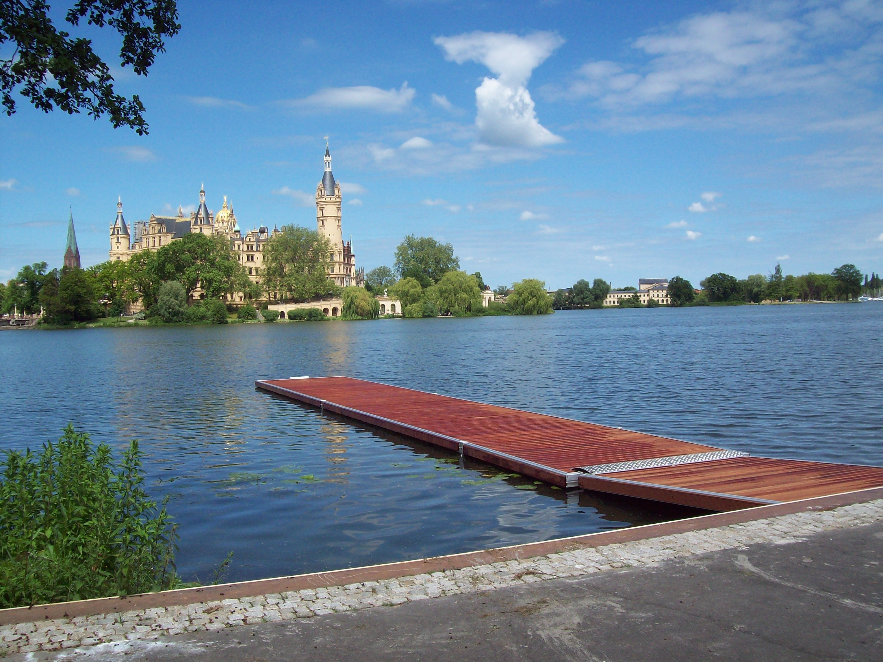 Gegenüber des Schweriner Schlosses